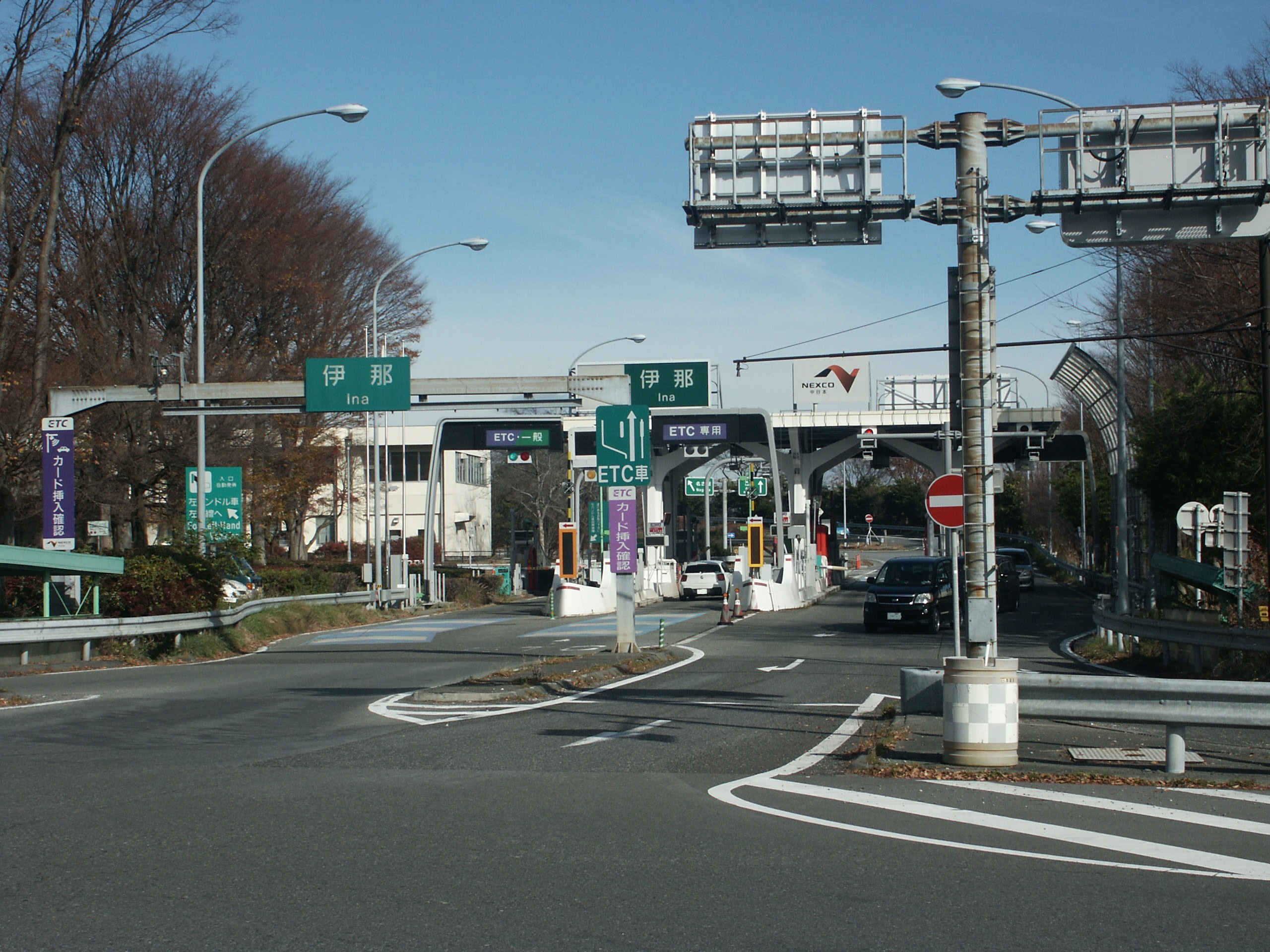 中央自動車道伊那インターチェンジ料金所（一般道から撮影）